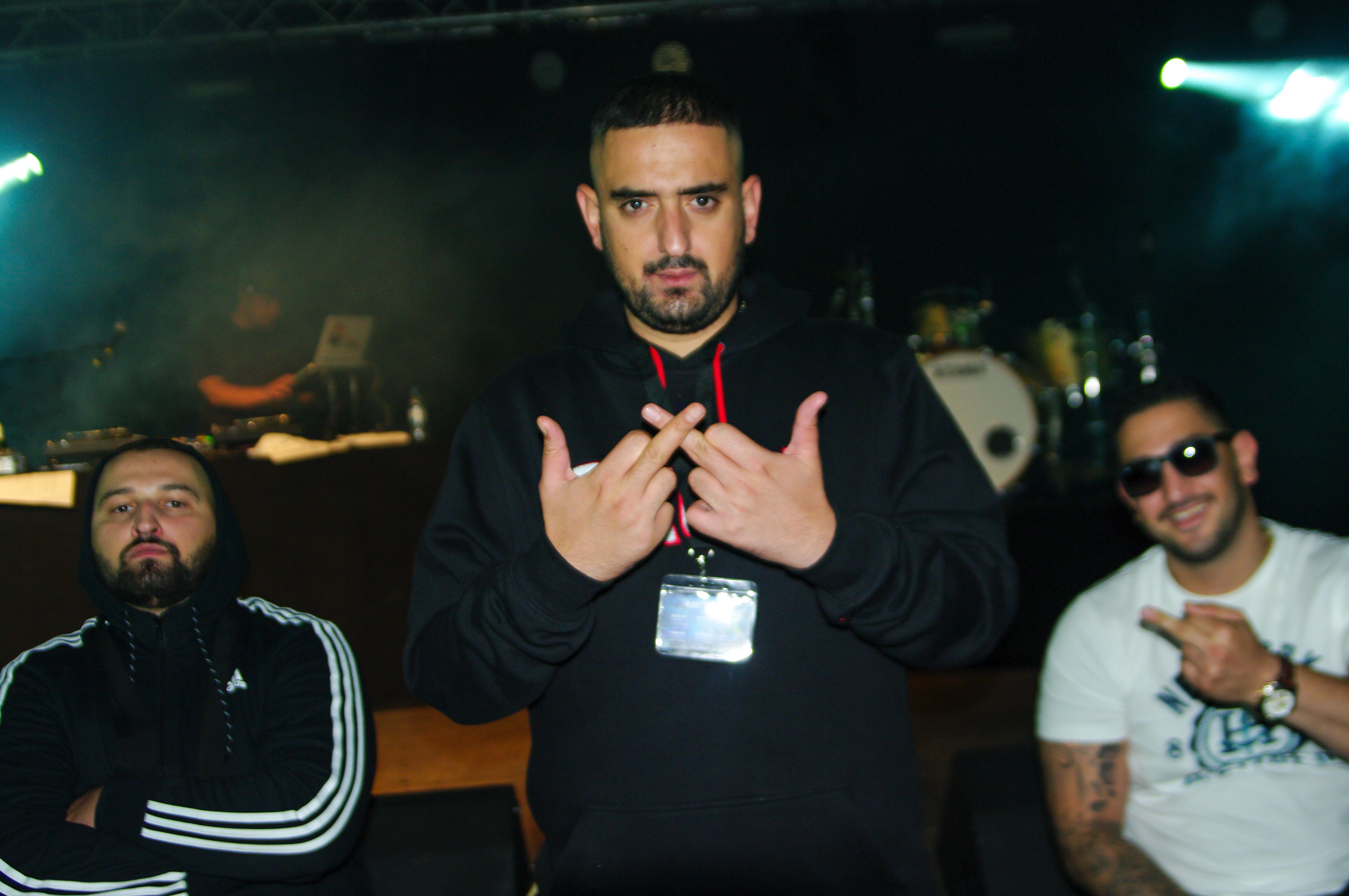 Place2Be Festival 2015 in Schwerin, u.a. mit Le Shuuk, Haftbefehl, BLINDERS, FIREBEATZ, Showtek, Vega, 187 STRASSENBANDE